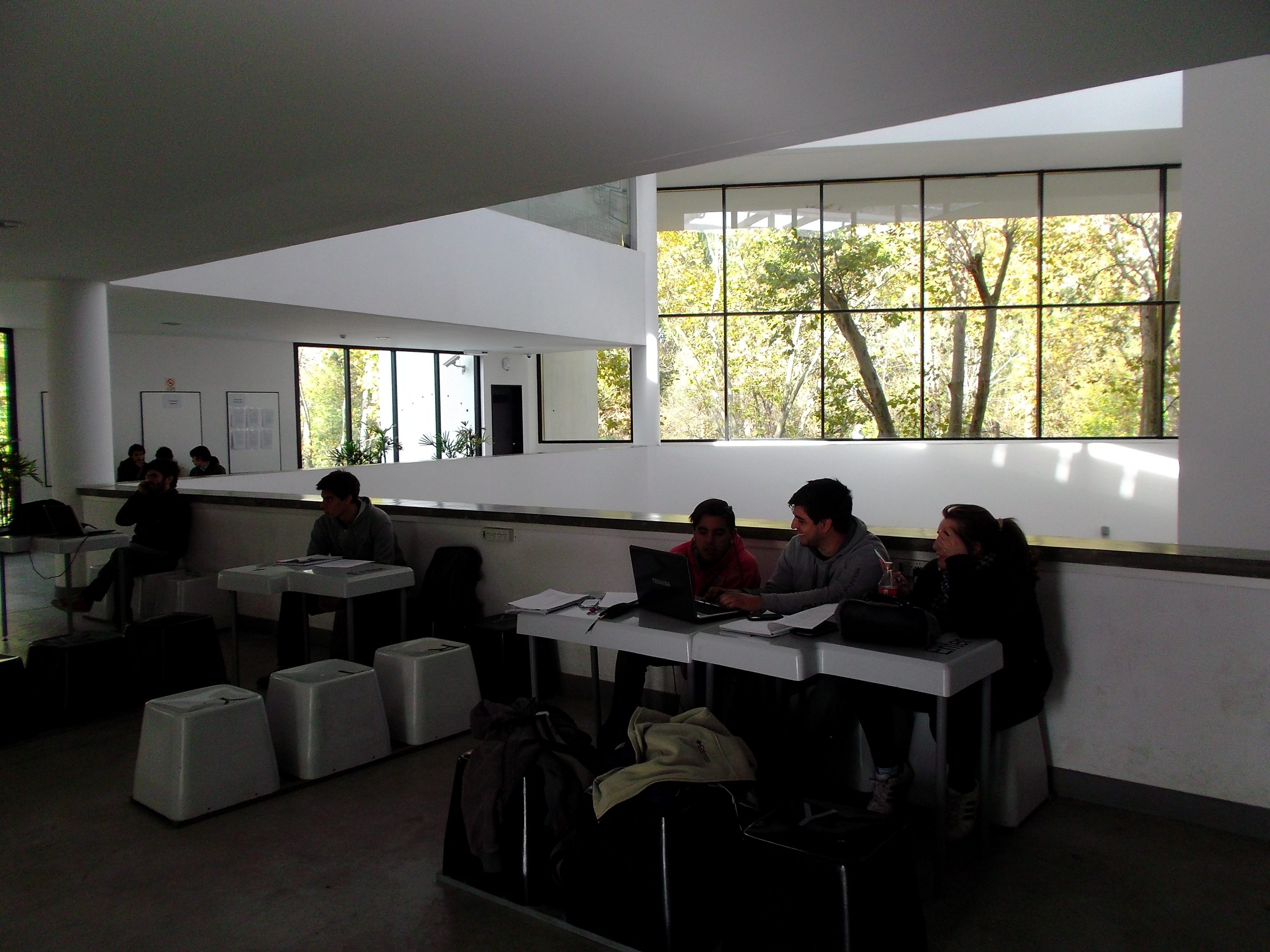 Facultad de Informática de la Universidad de La Plata. Mobiliario diseñado especialmente. Fotografía: Eric Hamilton.